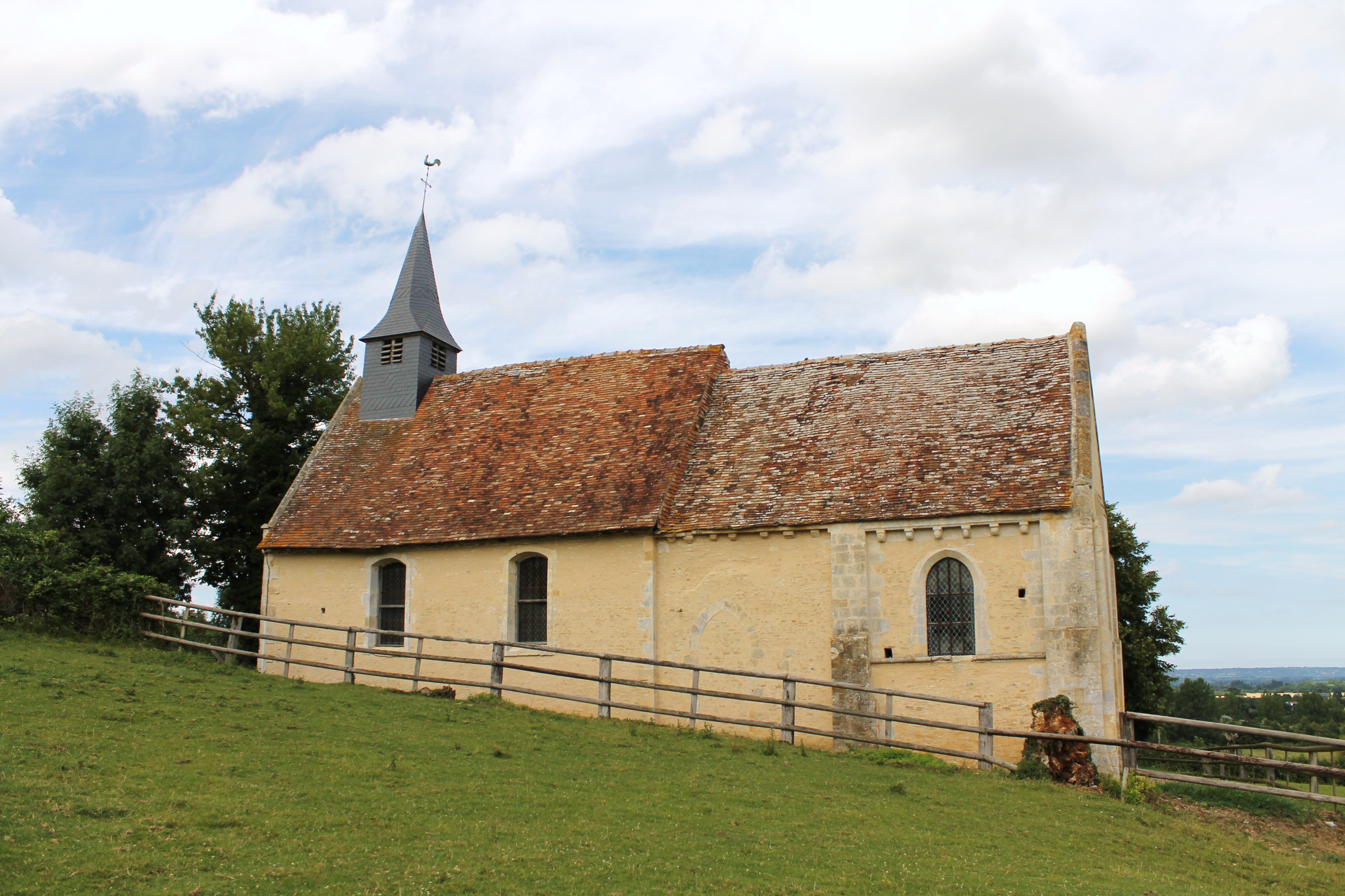 Église Saint-Pierre de Mirbel à Biéville-Quétiéville (Calvados)